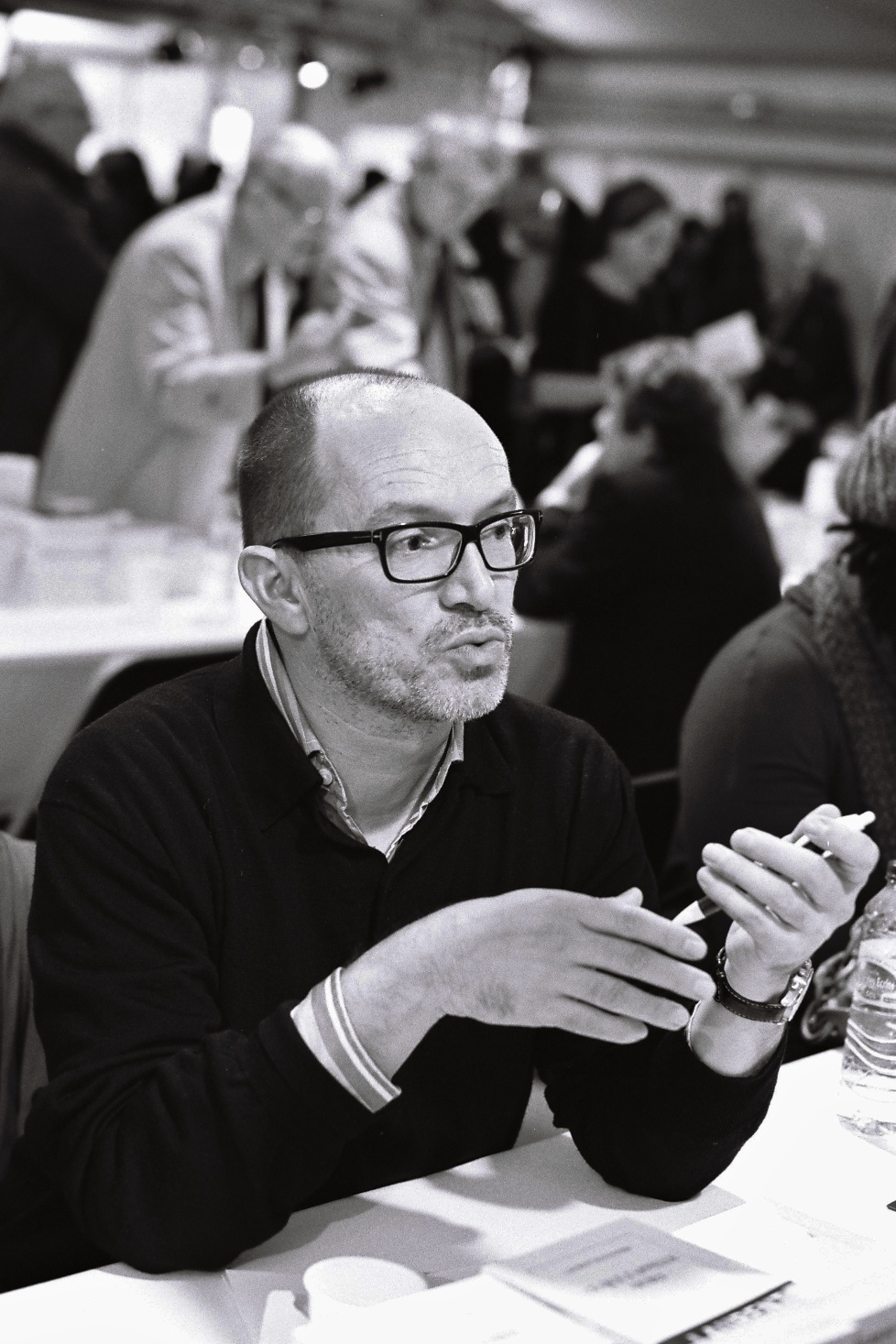 Laurent Mauvignier au salon du livre Radio France, 26 novembre 2011